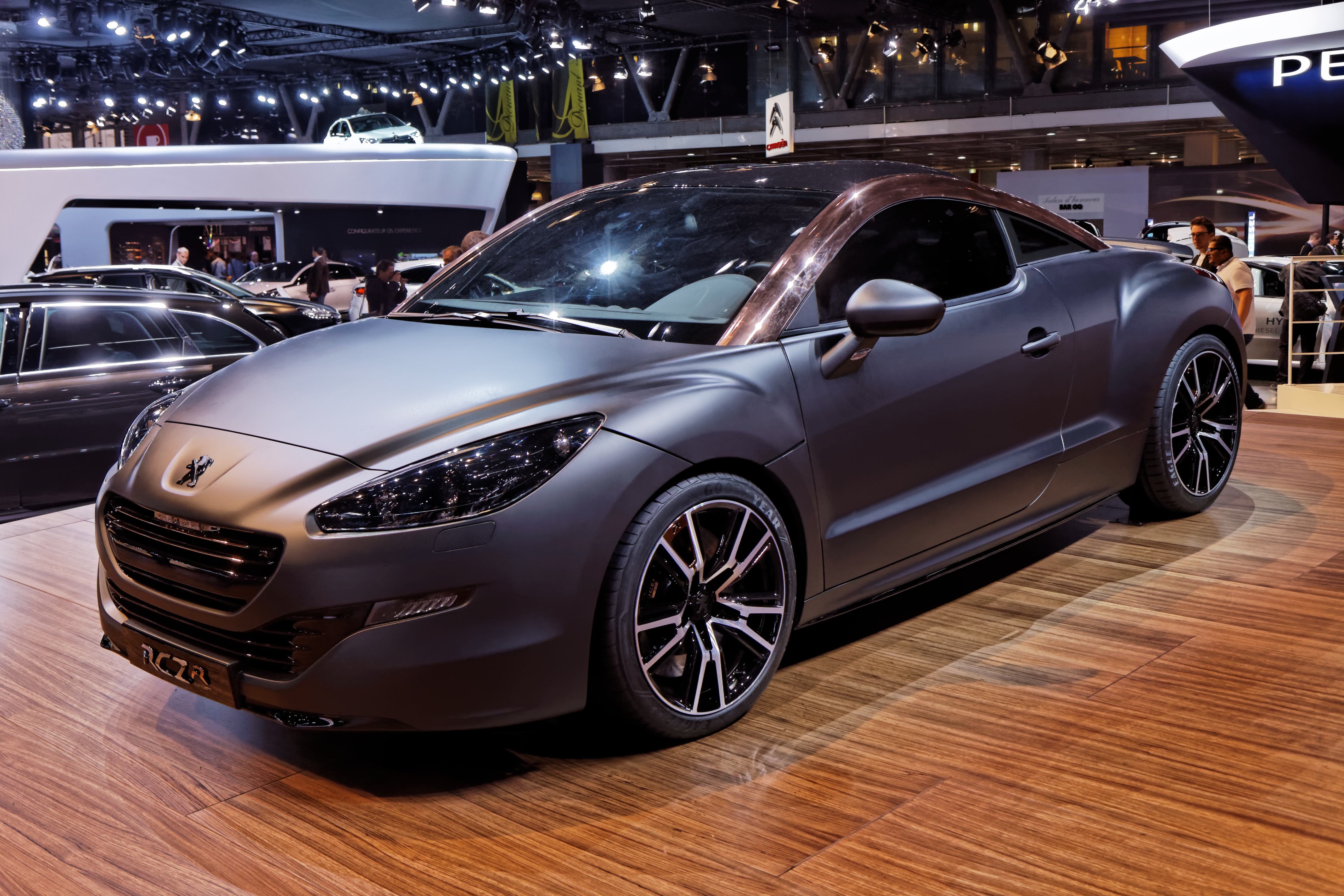 Une Peugeot RCZ-R présentée lors du Mondial de l'Automobile de Paris 2012.